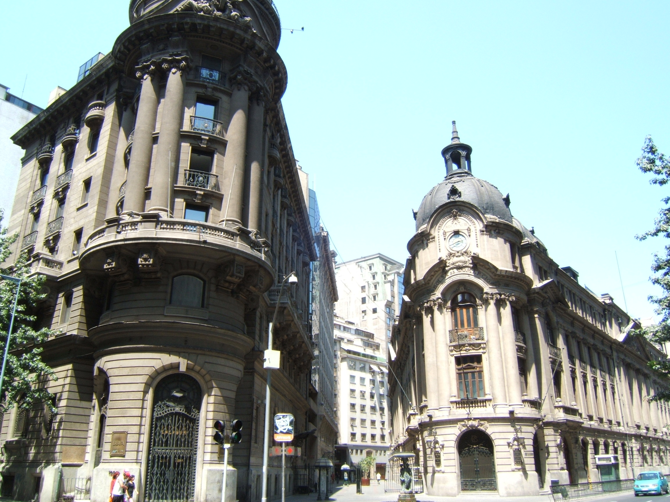 Barrio La Bolsa, Santiago de Chile.